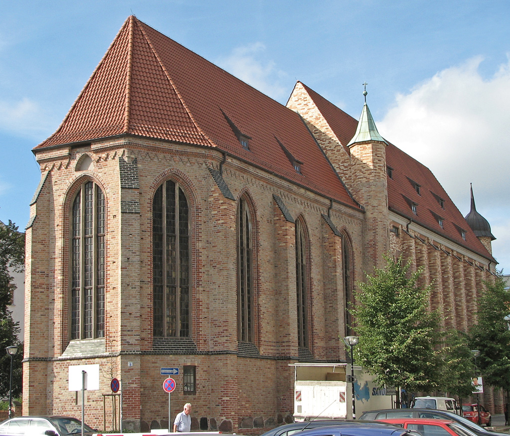 Beschreibung: Michaeliskloster in Rostock / Germany Fotograf: Darkone, 17. August 2005